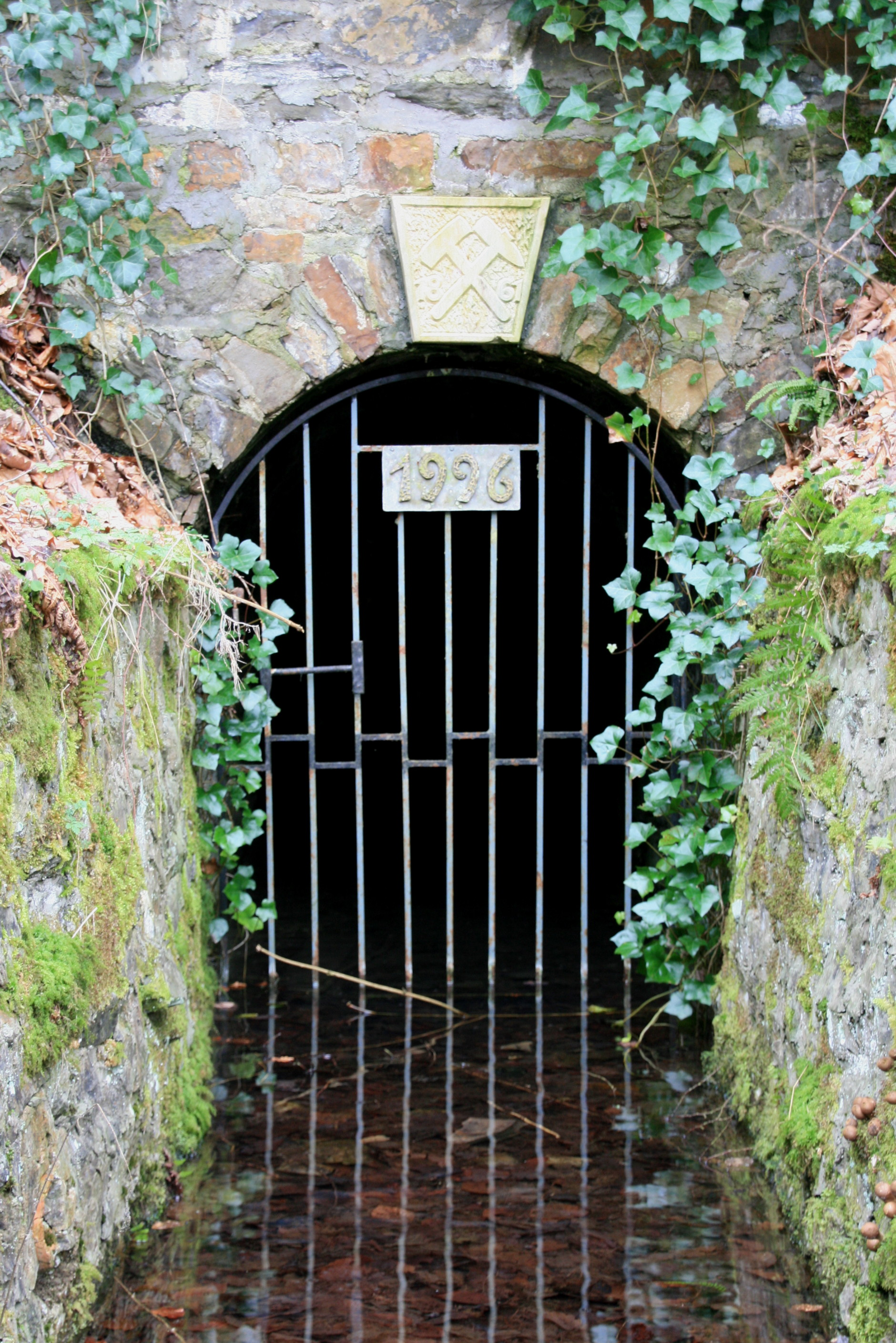 Mundloch des Carlstollens der Grube Friedrichssegen. Erbaut 1861, Mundloch und Vorplatz 1996 wieder hergerichtet. Friedrichssegen, Orteil von Lahnstein, Rheinland-Pfalz.